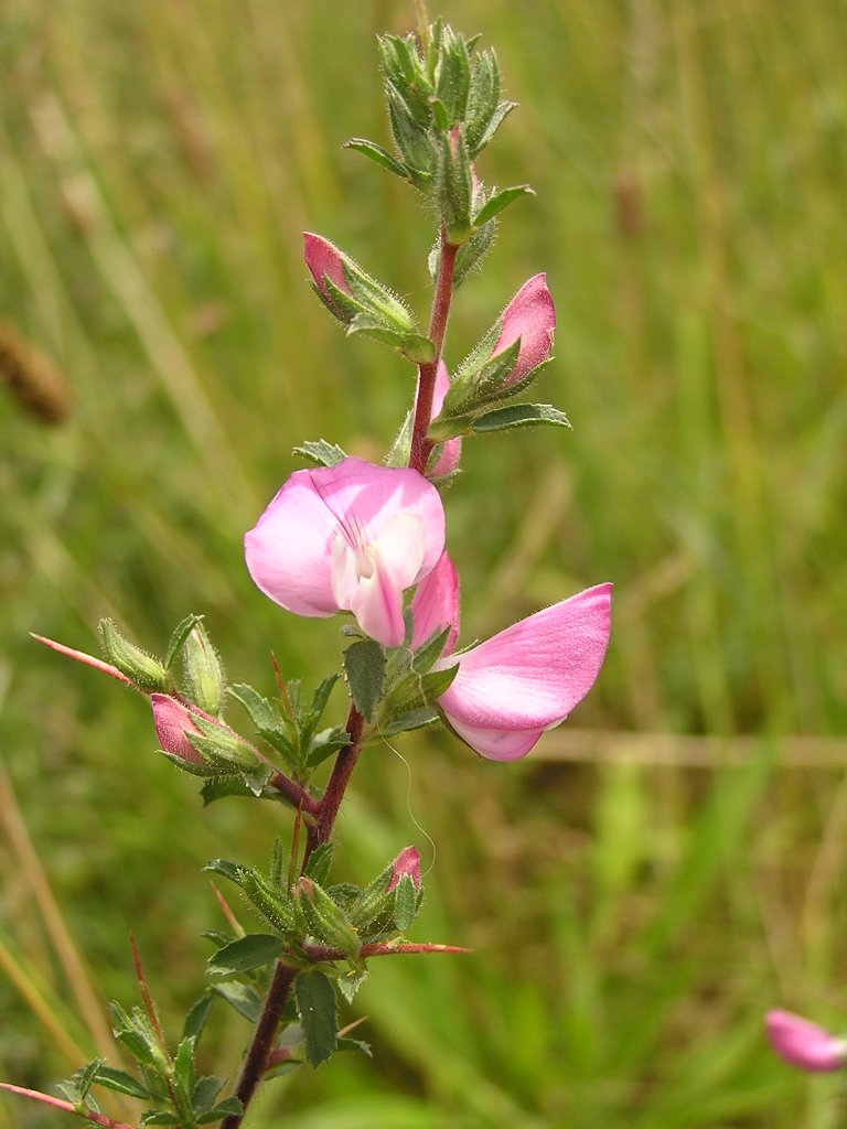 Ononis spinosa an einem Wegrand in Bonn.